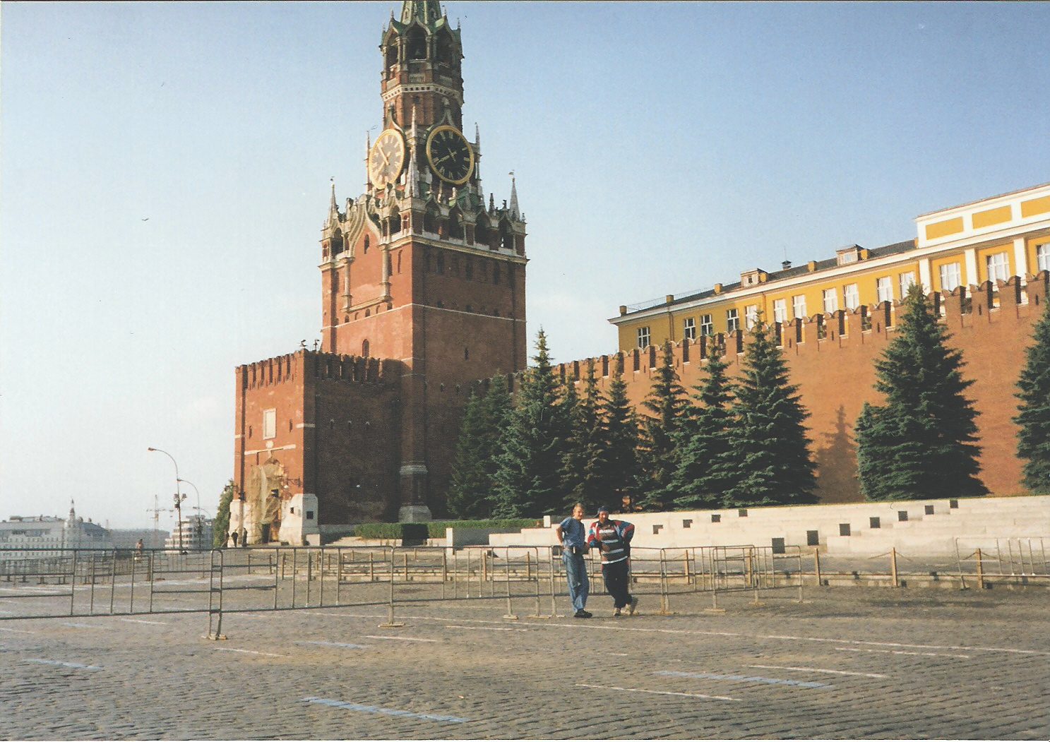 Jelcina nět